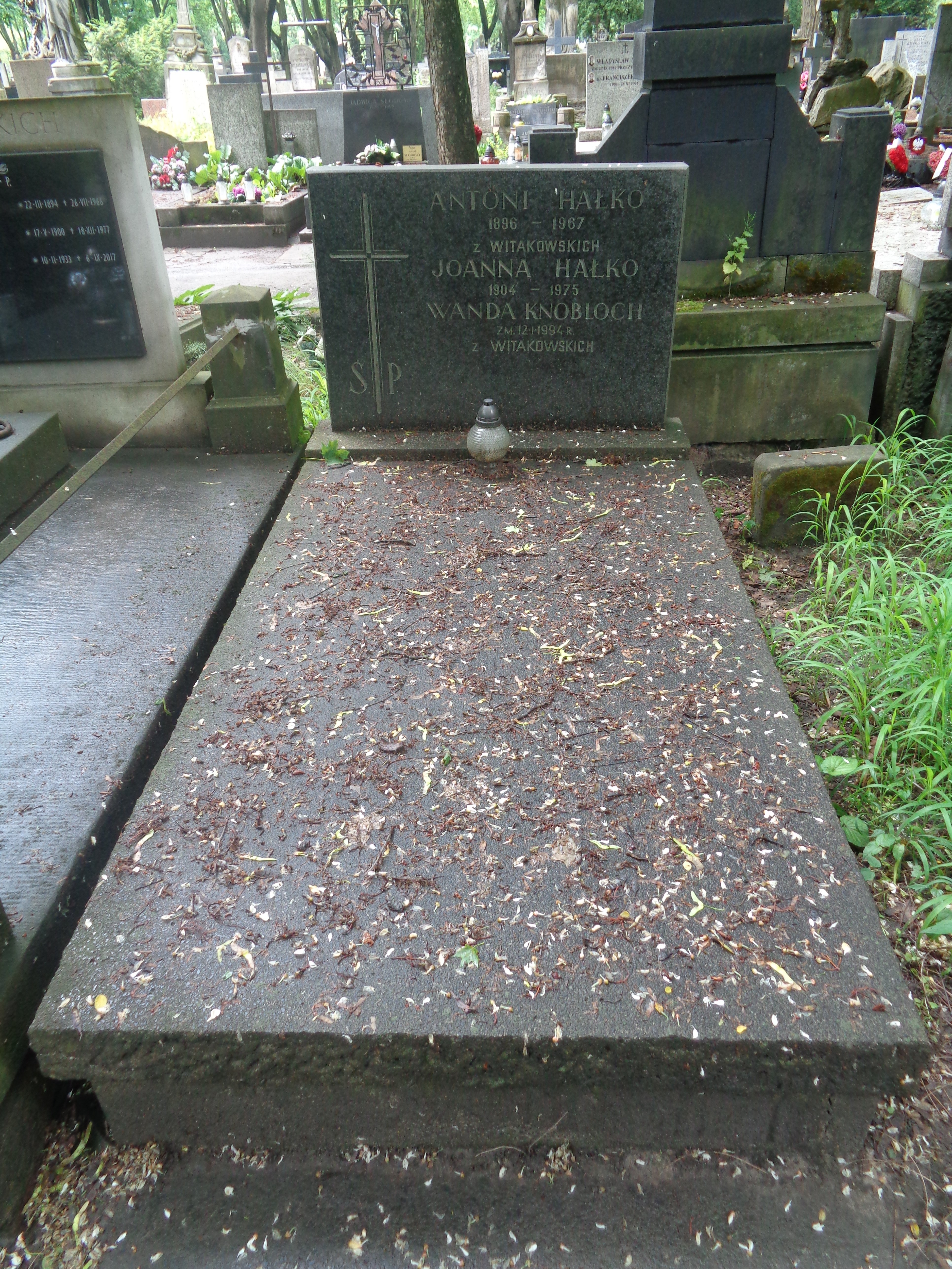 Grób Antoniego Hałko na Cmentarzu Powązkowskim